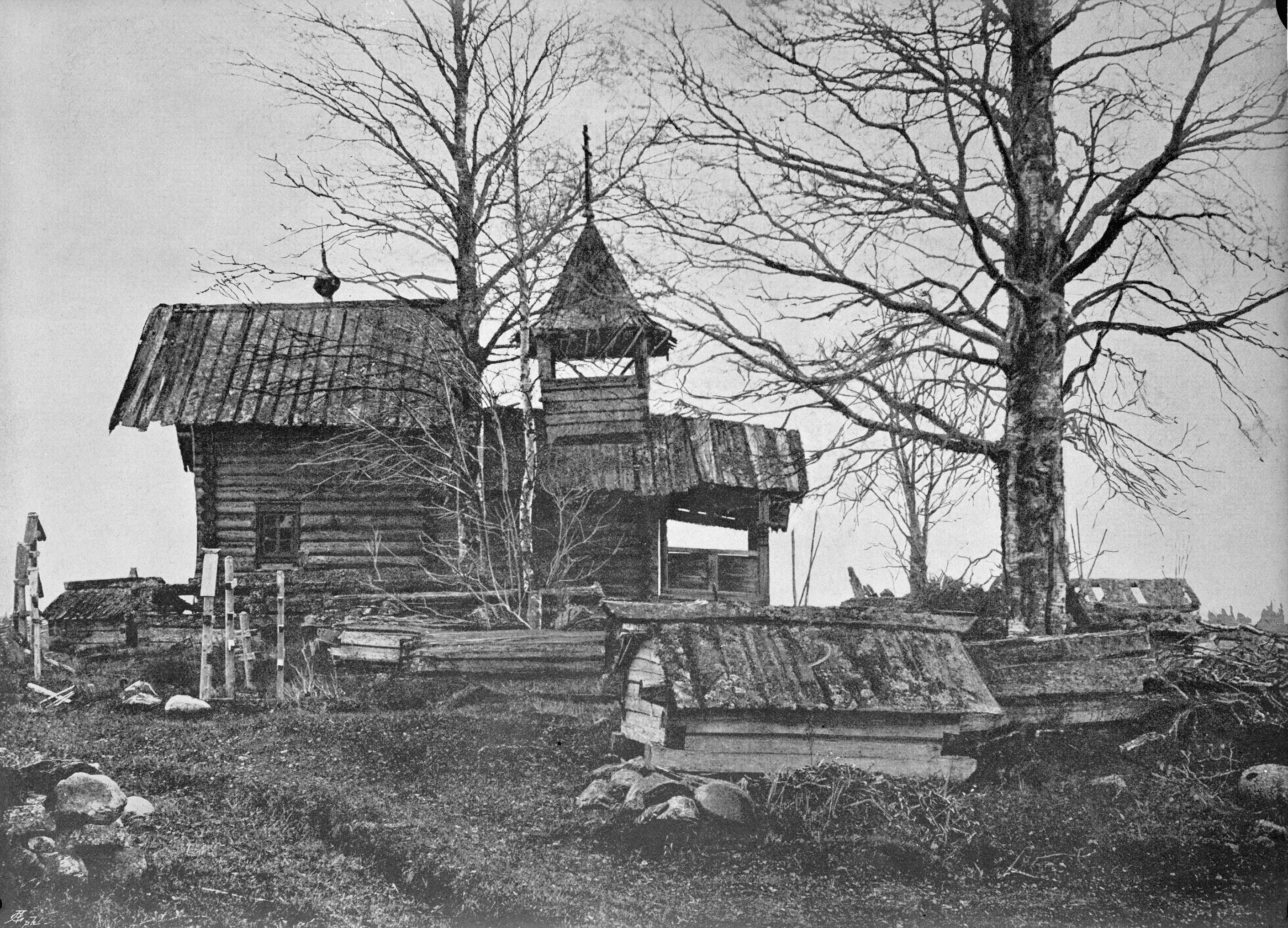 Kokkarin tsasouna Korpiselän Kokkarin kylässä.